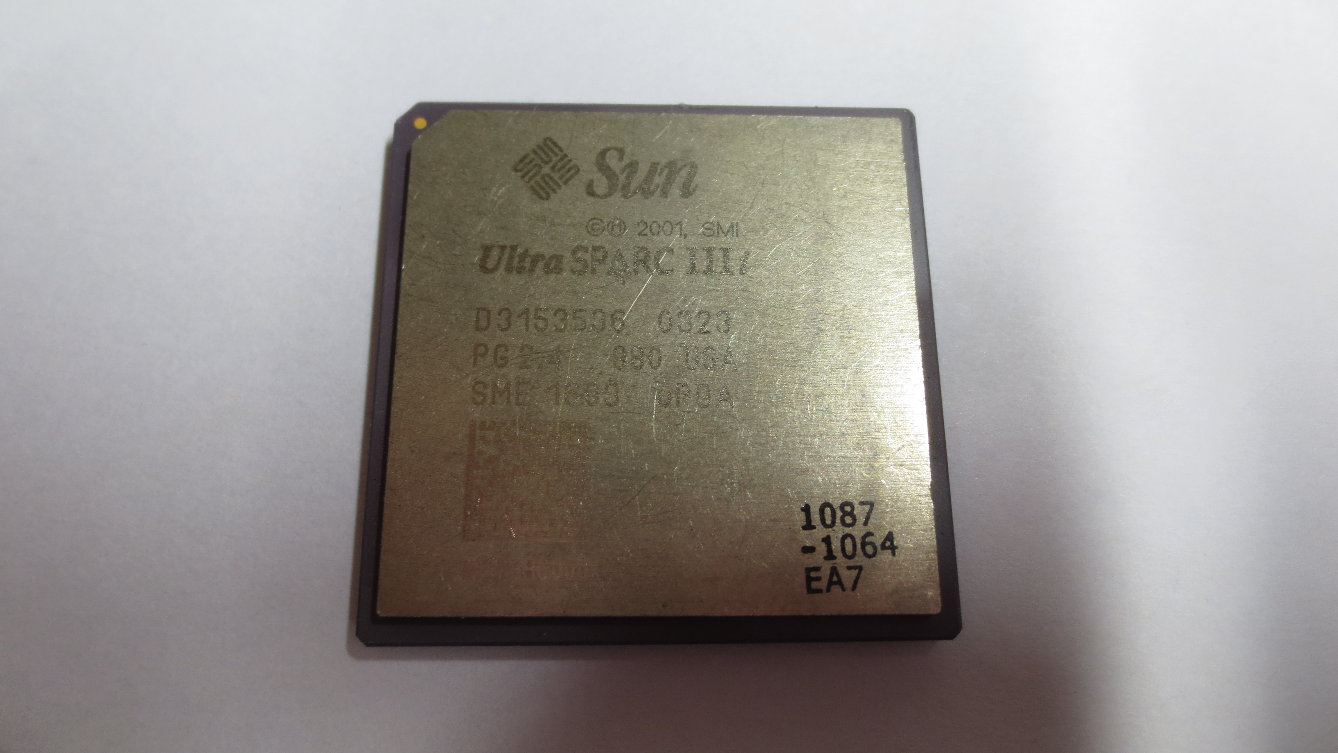 CPUの表面。core iシリーズと比べると一回り大きい。